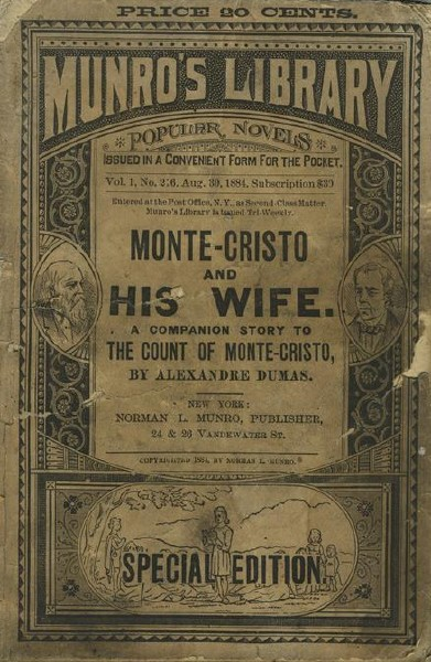 Portada de la obra literaria de Jacob Abarbanell: "Monte Cristo and his wife"